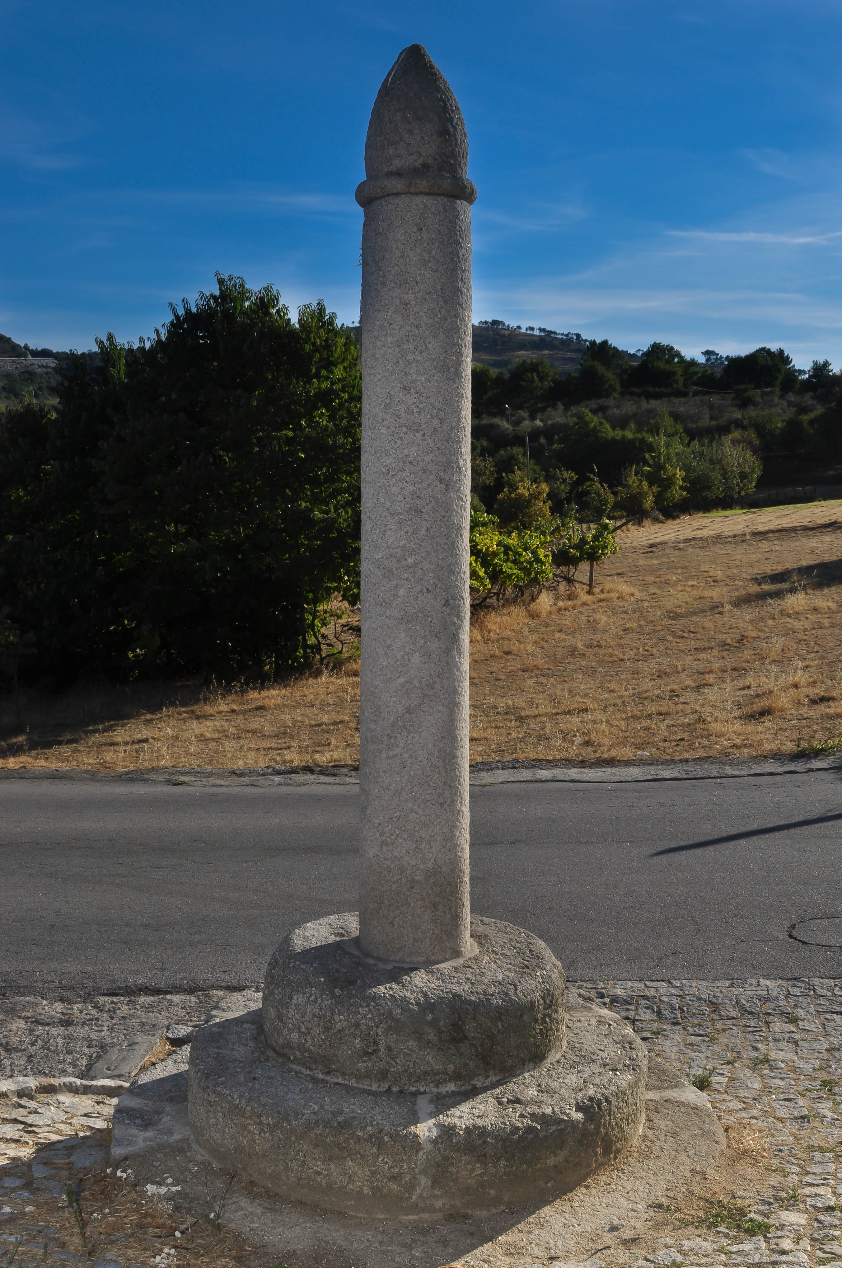 Foto do Pelourinho de Vila Nova de Souto D'El-Rei